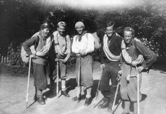 Wyprawa wysokogórska w Alpy Francuskie. Uczestnicy wyprawy Jan Alfred Szczepański, Konstanty Narkiewicz-Jodko, Witold Wyszyński, Jerzy Gołcz, Jan Dorawski w Chamonix.